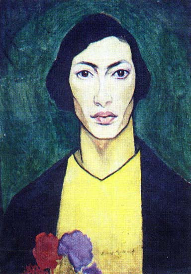 Альтман Натан Исаевич (автопортрет, 1911) Государственный Русский музей.